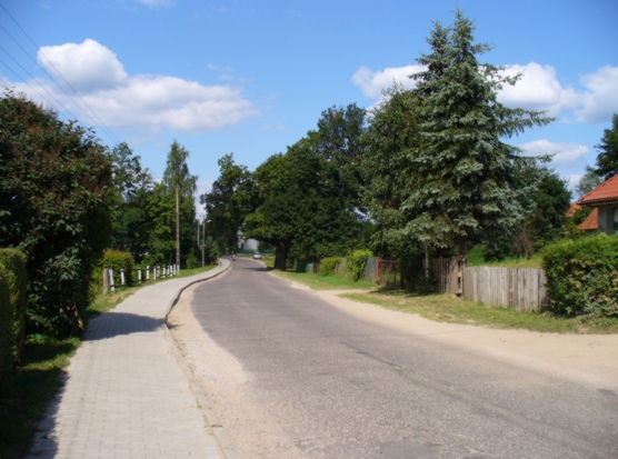 Jeziorowskie